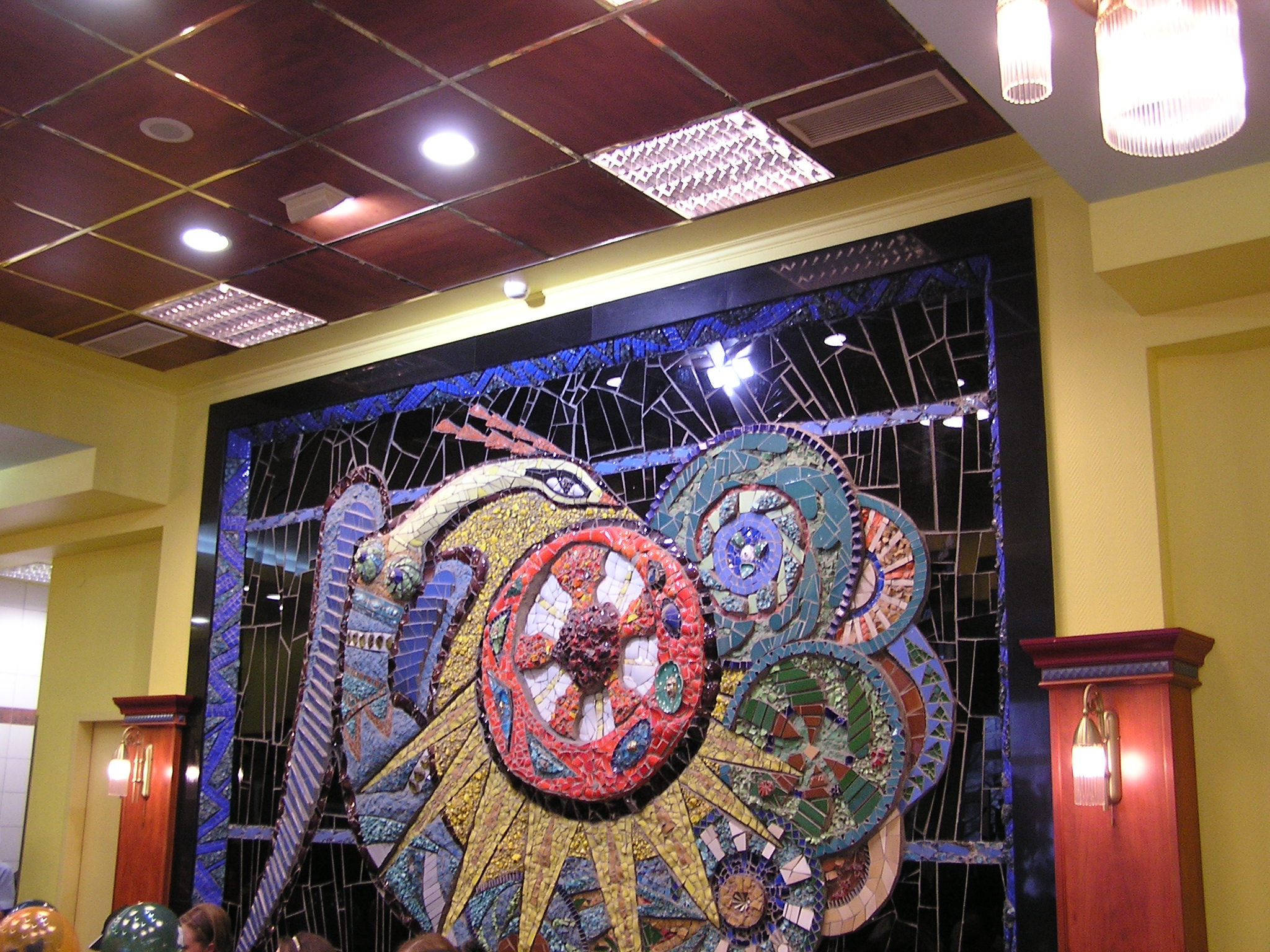 Донецк. Площадь Ленина